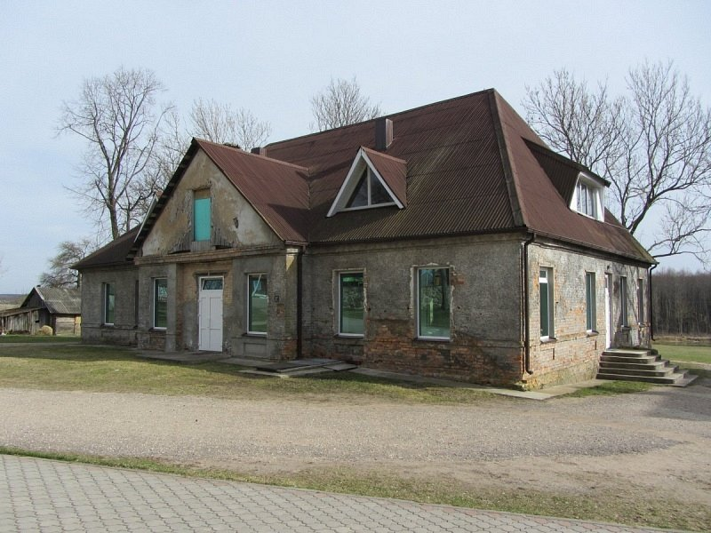 Асава. Плябанія